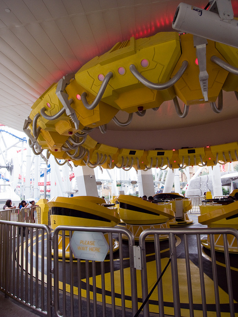 R0012123